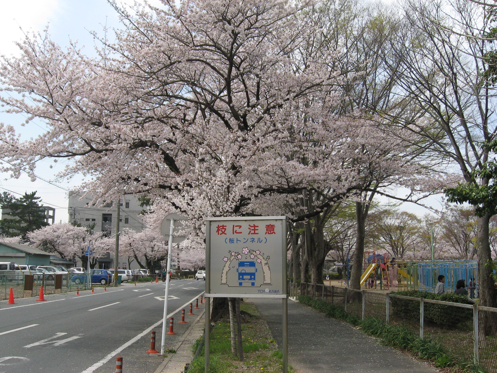 豊川市の桜トンネル東端